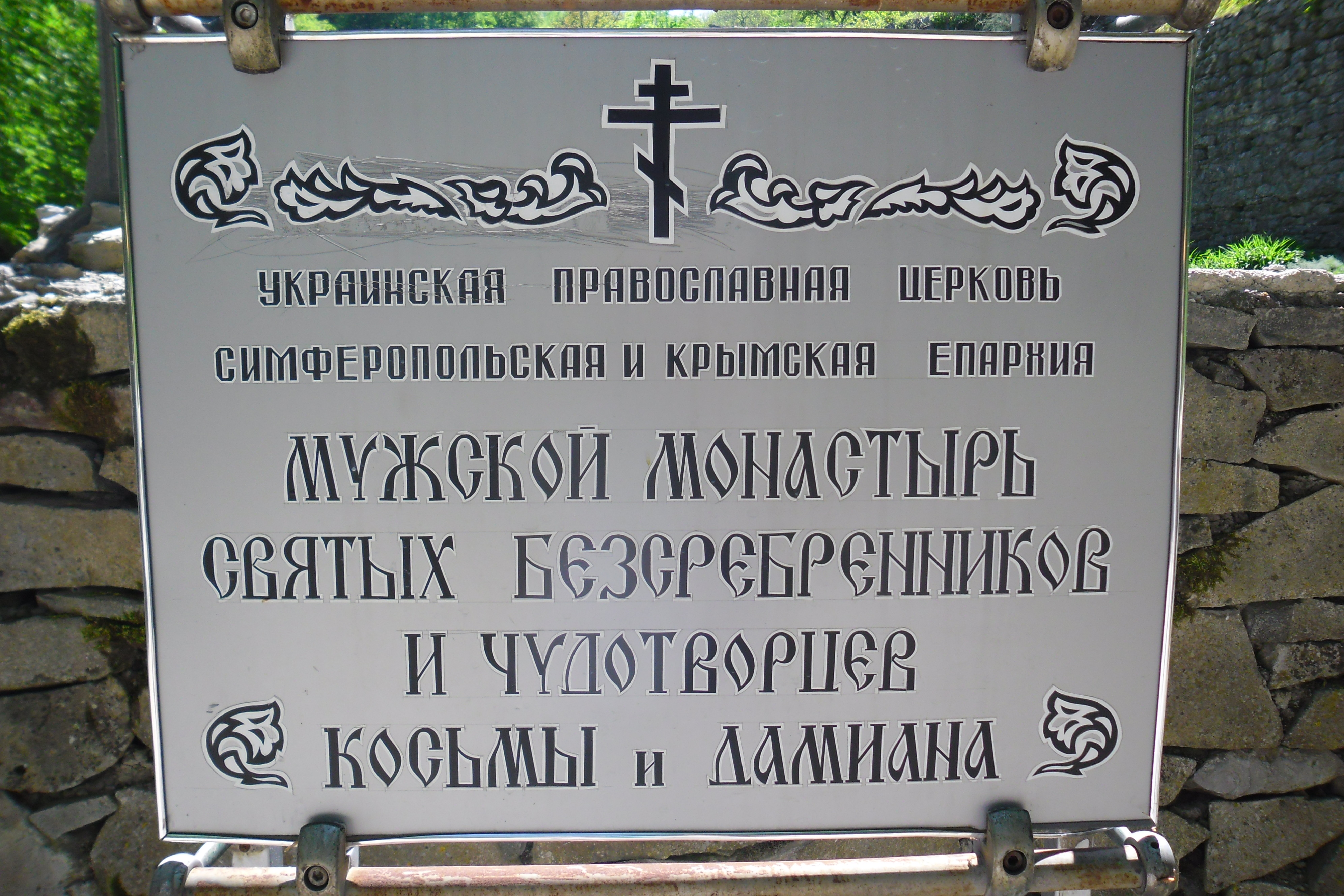 Фото